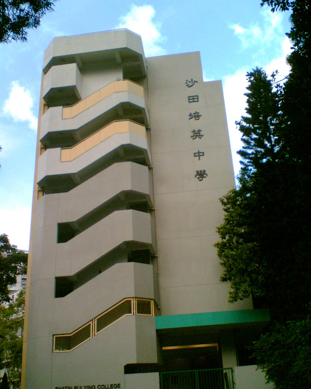 中文（香港）: 沙田培英中學。